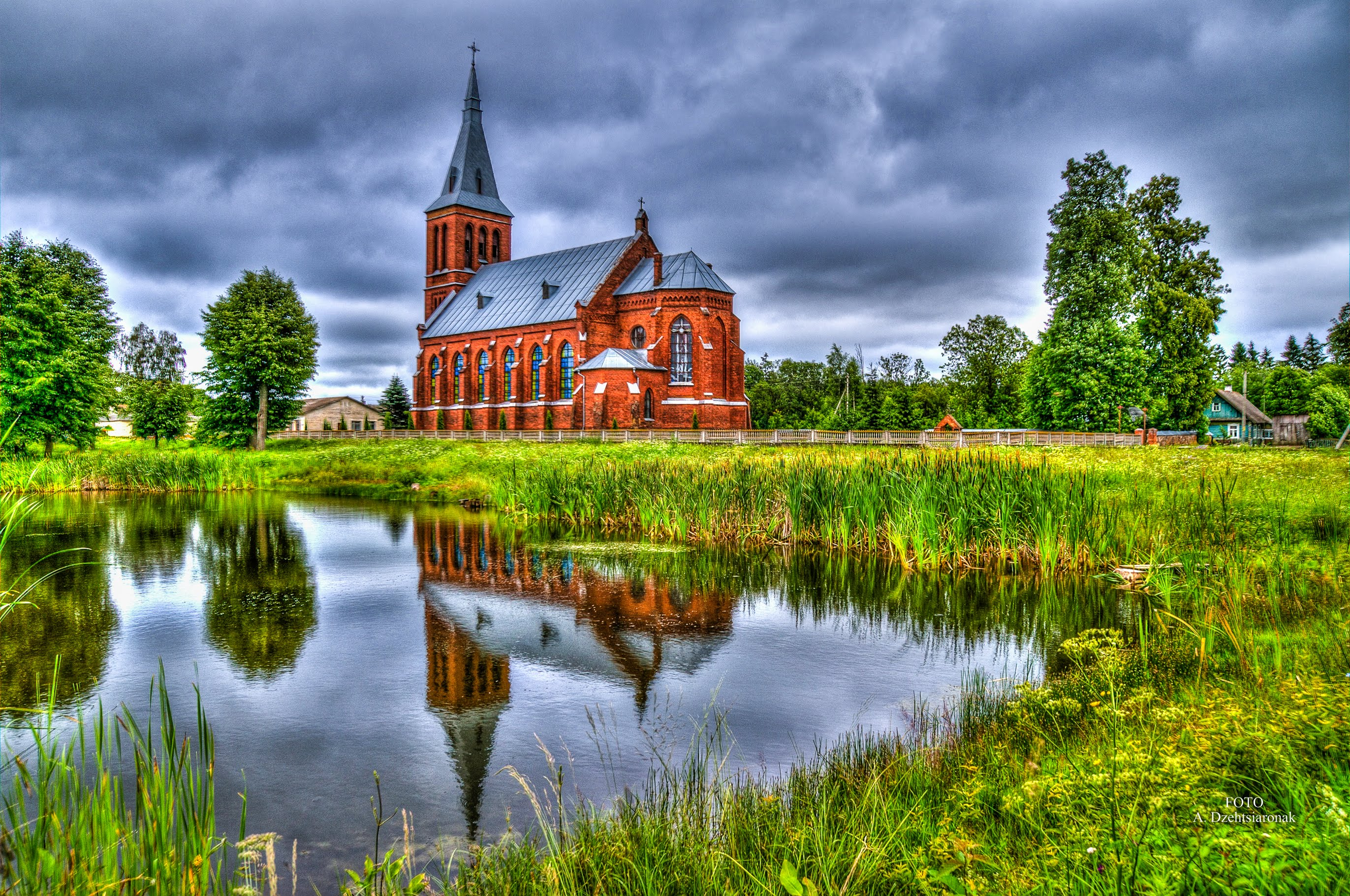 Альковічы. Касцёл Наведвання Дзевы Марыі This is a photo of Belarusian heritage monument. Reference number: 612Г000126 ( WLM)